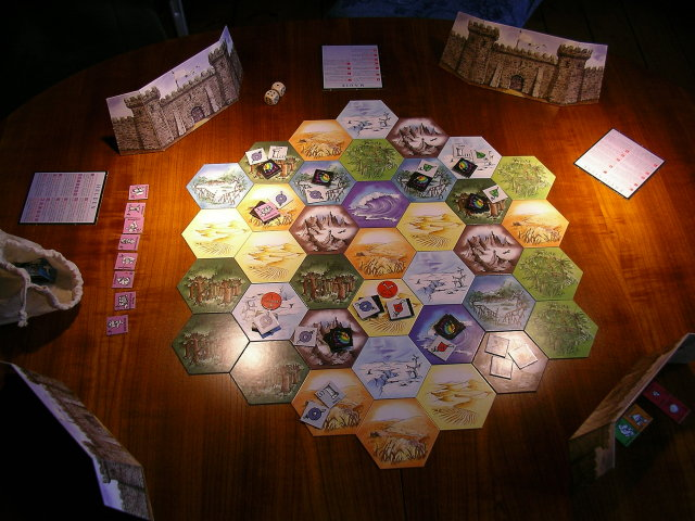 Spielplan von Kings & Things